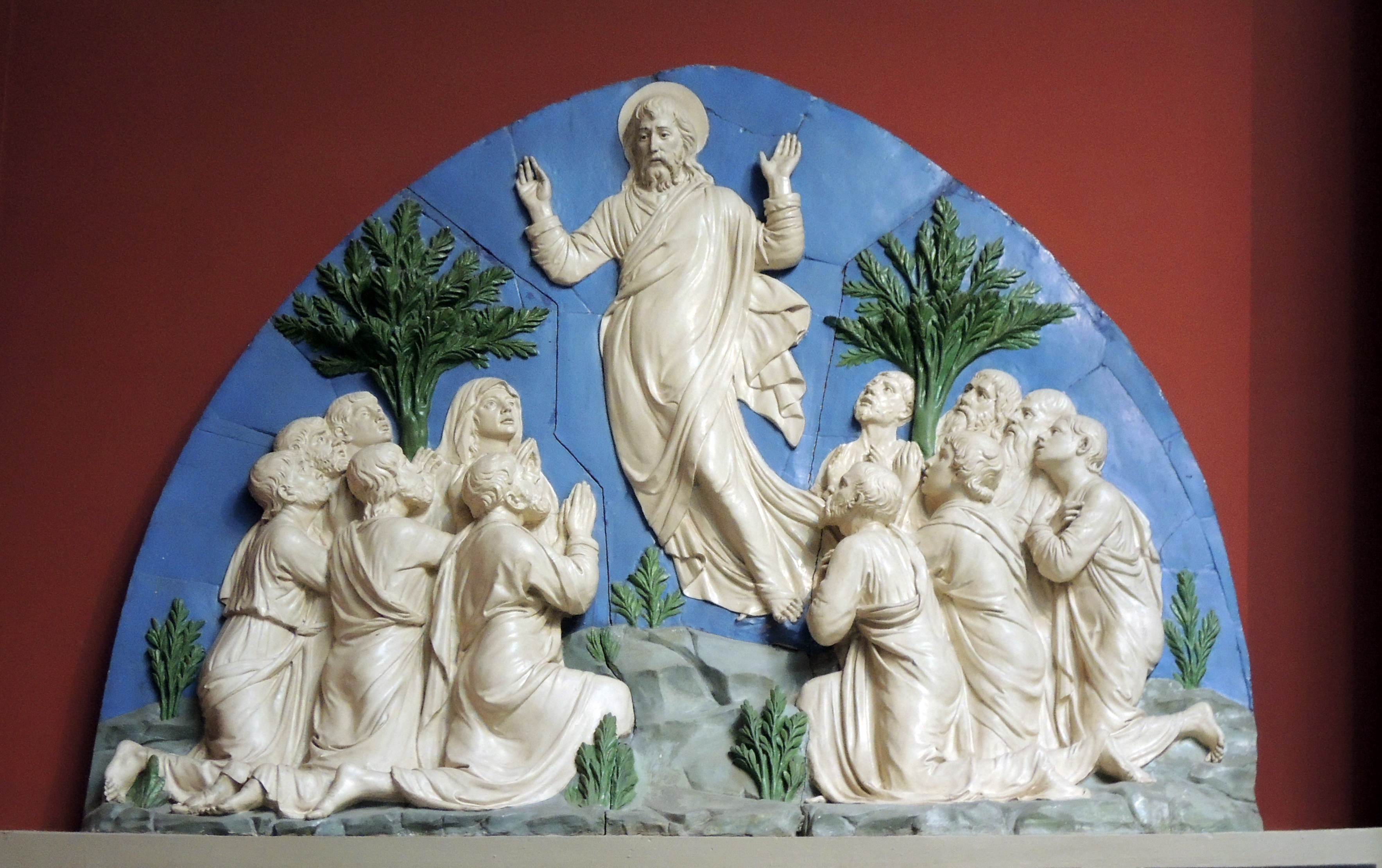 Лука делла Роббиа. Вознесение. 1442-5. Санта Мария дель Фьоре, Флоренция. Люнета над входом в Южную Сакристию.